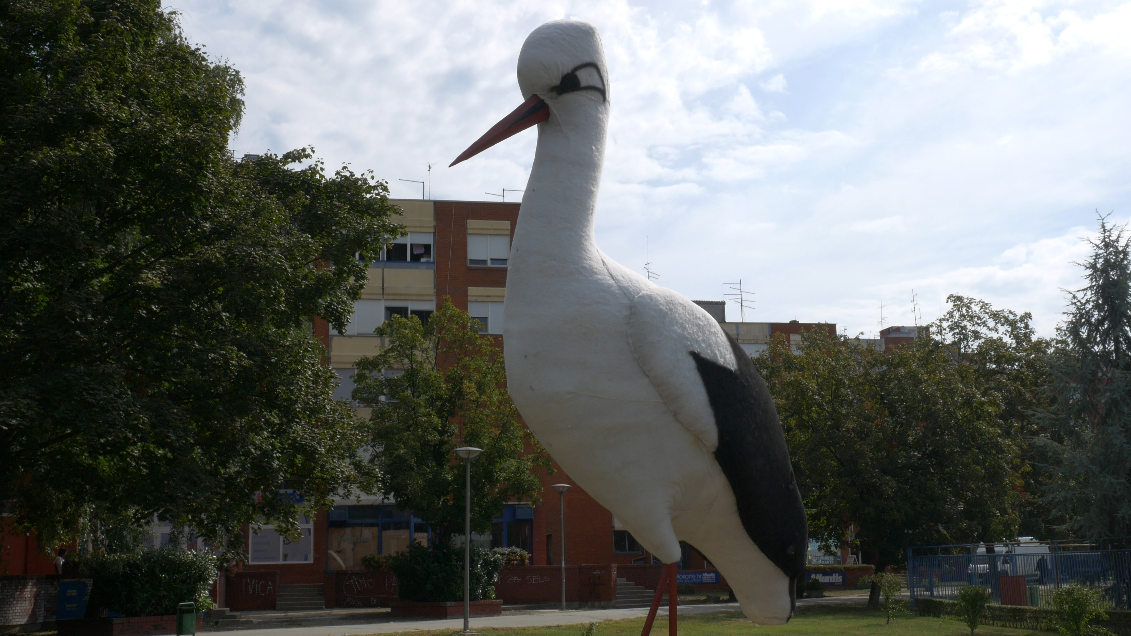 Maketa Klepetana u Slavonskom Brodu